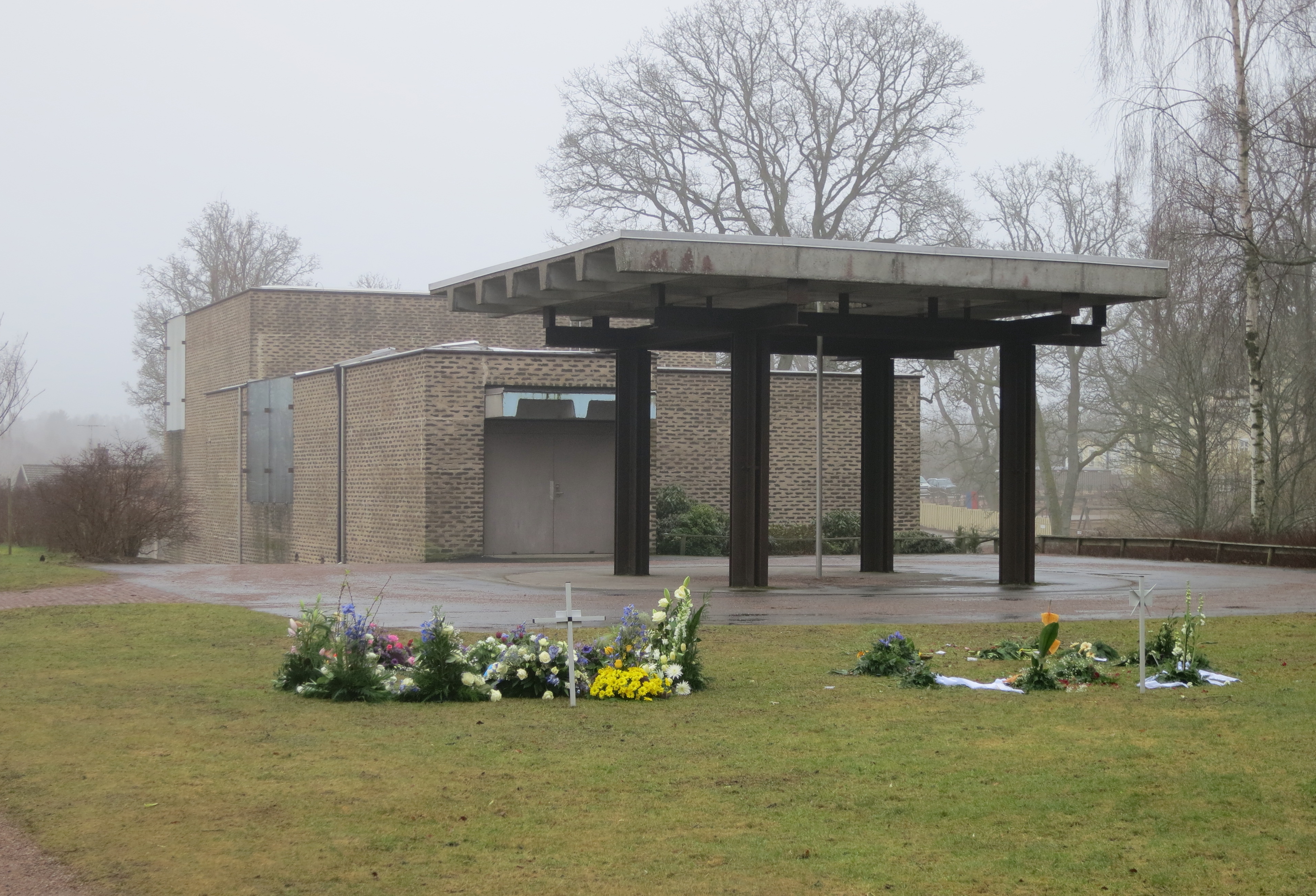 Klockarebackens kapell i Höör